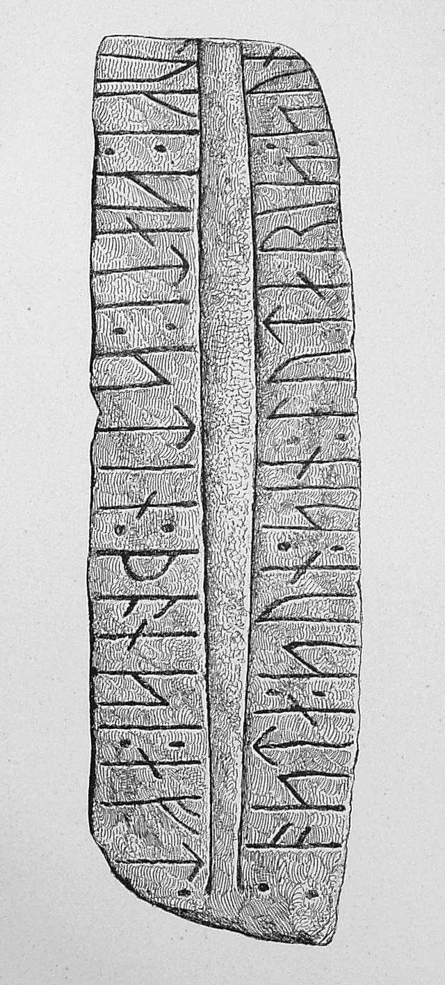 Ferslev-stenen 1 er en runesten, fundet i Ferslev (Aalborg Kommune.